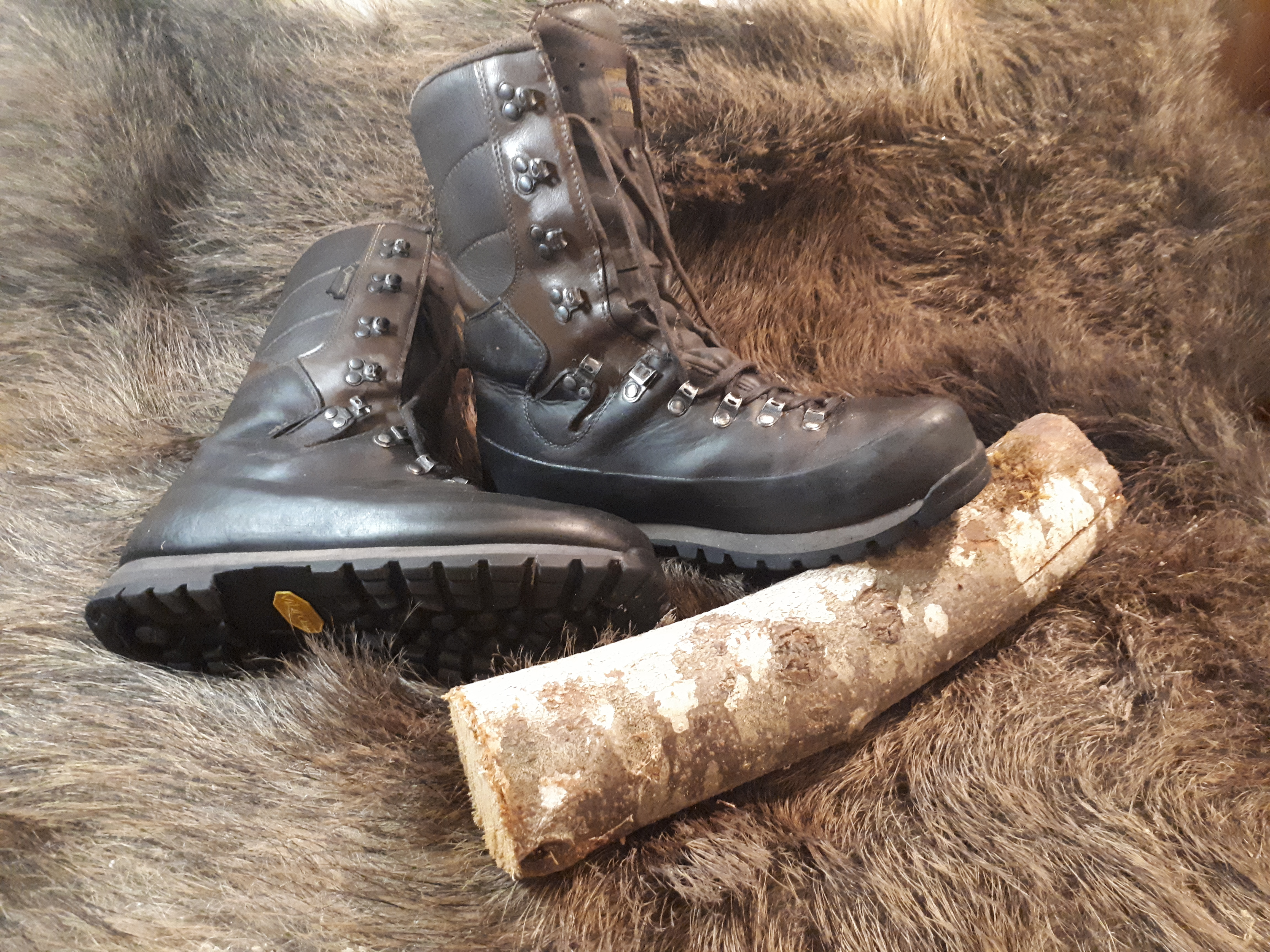 Kõrge sääreosaga raskemates oludes kasutamiseks mõeldud matka ja jahisaapad.